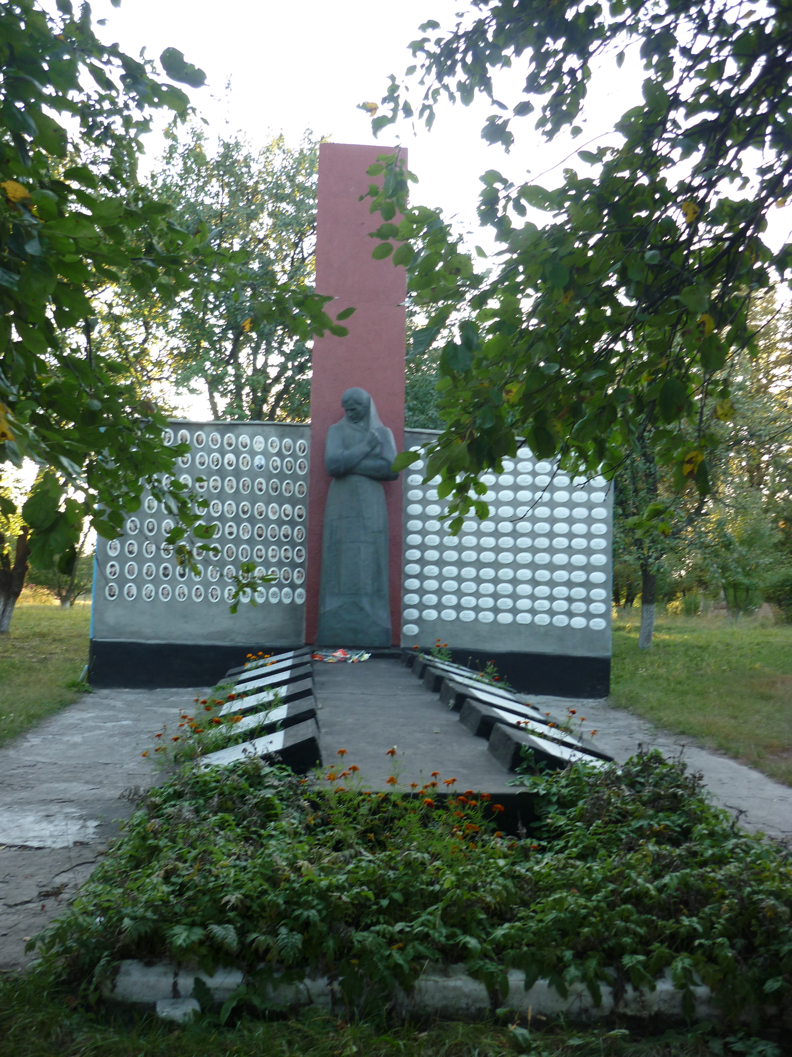 село Нова Осота Олександрівського району Кіровоградської області